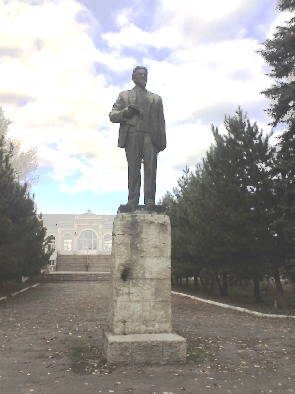 Район вокзала города Красный Сулин связан с пребыванием на сулинской земле М.И.Калинина. Калинин Михаил Иванович (1868-1946) – председатель ВЦИК РСФСР. Всероссийский староста, с мая 1919 по декабрь 1920 года совершил 12 поездок по стране на агитпоезде «Октябрьская революция» и посетил 260 городов и сёл. В августе 1920 года он был в Красном Сулине, выступил на многолюдном митинге перед металлургами, встретился с сулинцами в Народном Доме, где рассказал о международном и внутреннем положении молодой советской республики, ответил на многочисленные вопросы. В память об этом приезде в Сулин создан памятник и установлена мемориальная доска. Памятник поставлен на привокзальной площади 25 апреля 1982 года.